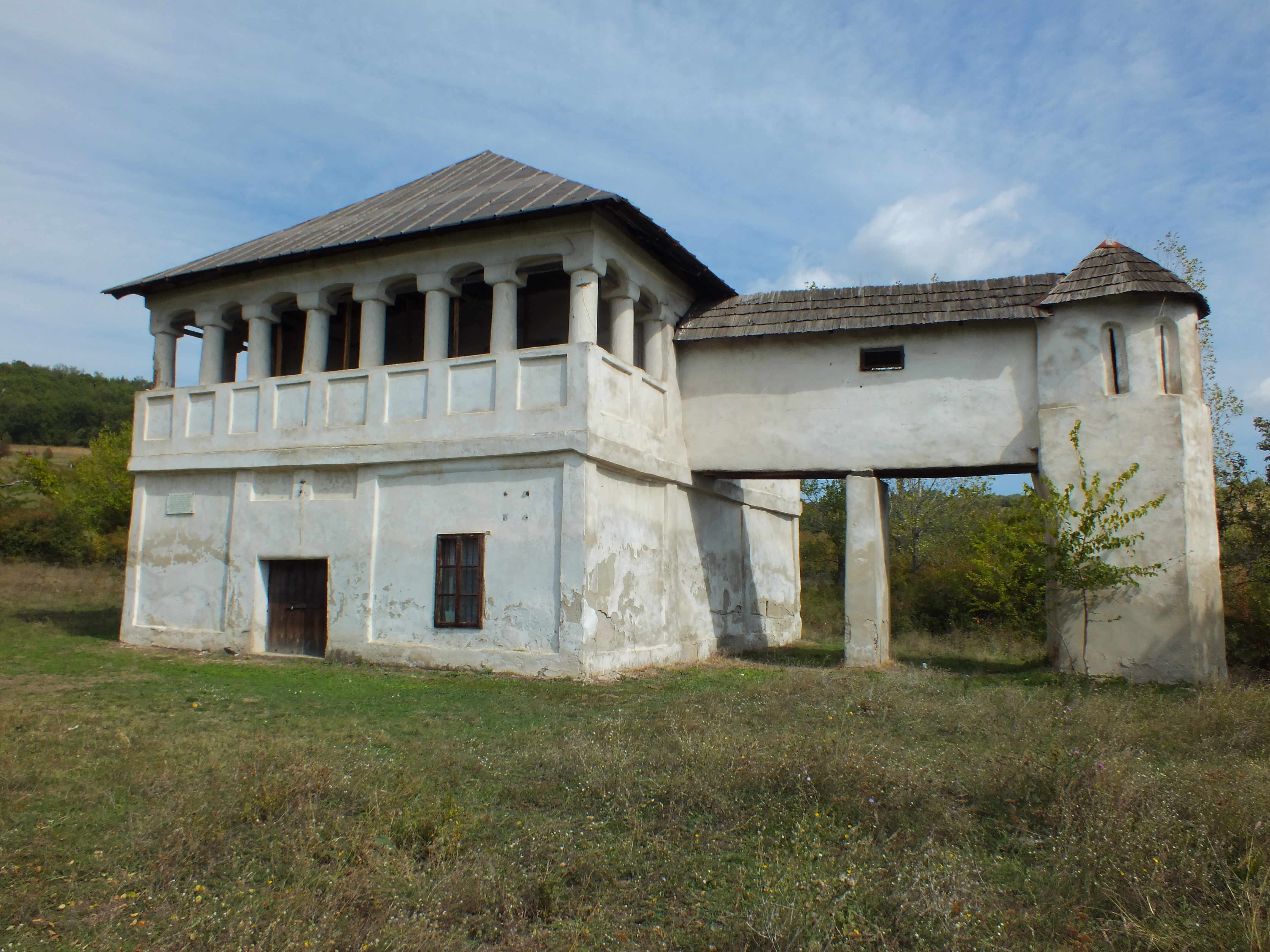 Cula Tudor Vladimirescu, sat Cerneți, comuna Șimian Cula slugerului Tudor Vladimirescu, conducătorul mișcării revoluționare din anul 1821. A fost construită în jurul anului 1800 și a servit ca depozit de arme în vederea declanșării mișcării revoluționare de la 1821. Tudor Vladimirescu a trecut ultima dată pe aici la 29 ianuarie 1821. 05)